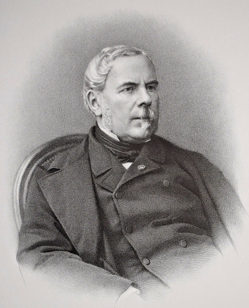 Napoléon Daru, ministre français